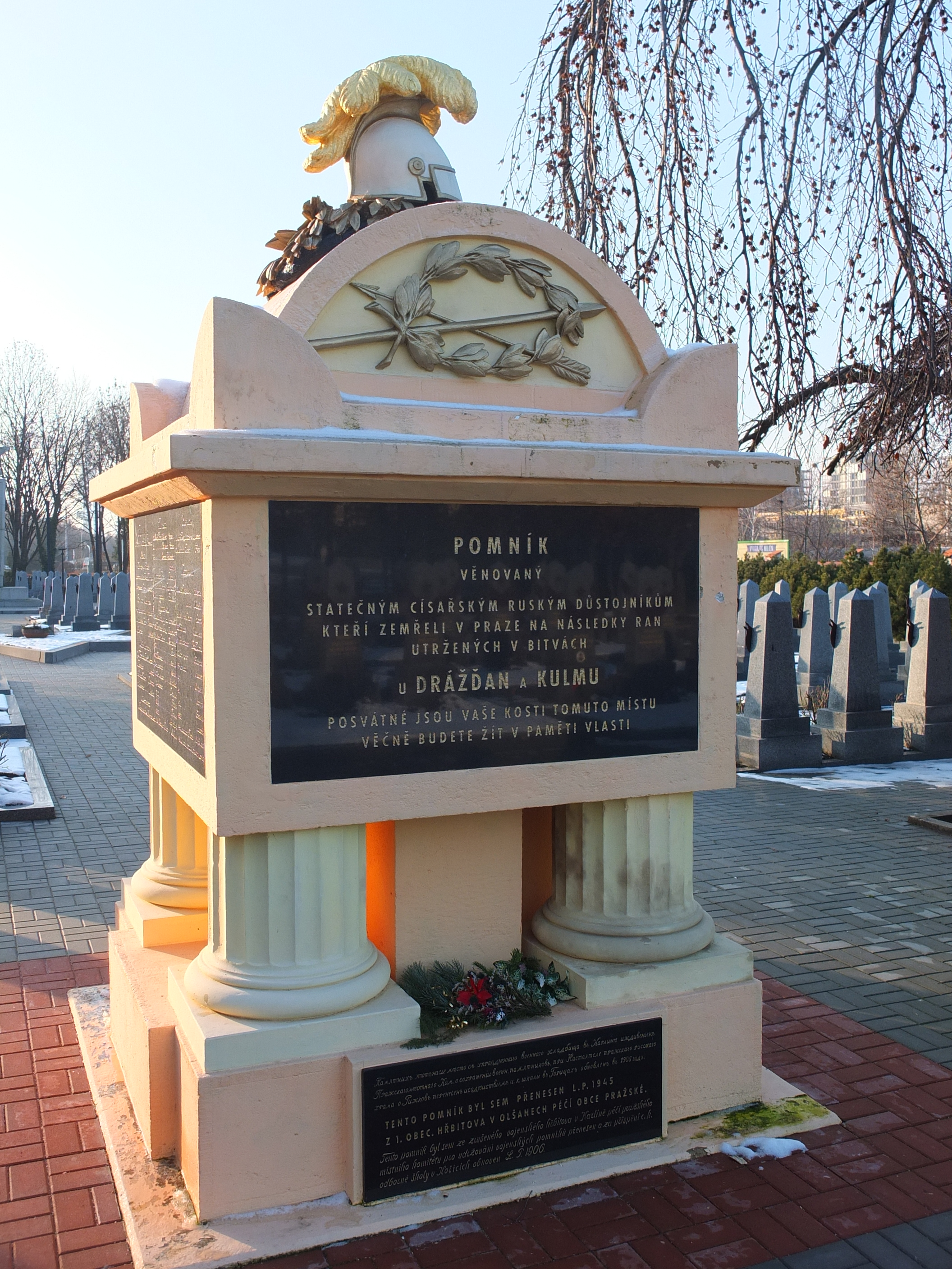 Pomník bitvy padlým ruským důstojníků v bitvě u Drážďan, Olšanské hřbitovy